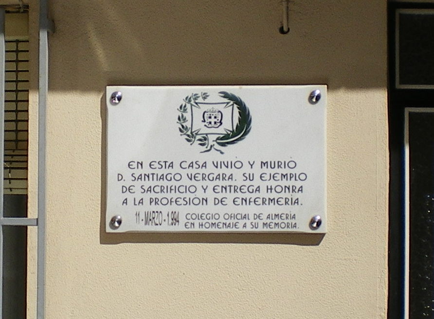 Casa de Almería, España, donde vivió el enfermero Santiago Vergara Cañadas, y cuya calle está dedicada; antigua calle Escondrijos.